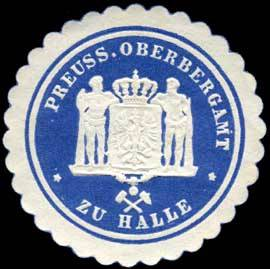 Sealing stamp Title: Preussisches Oberbergamt zu Halle Description: blau, weiß, geprägt Place: Halle size: 4 cm